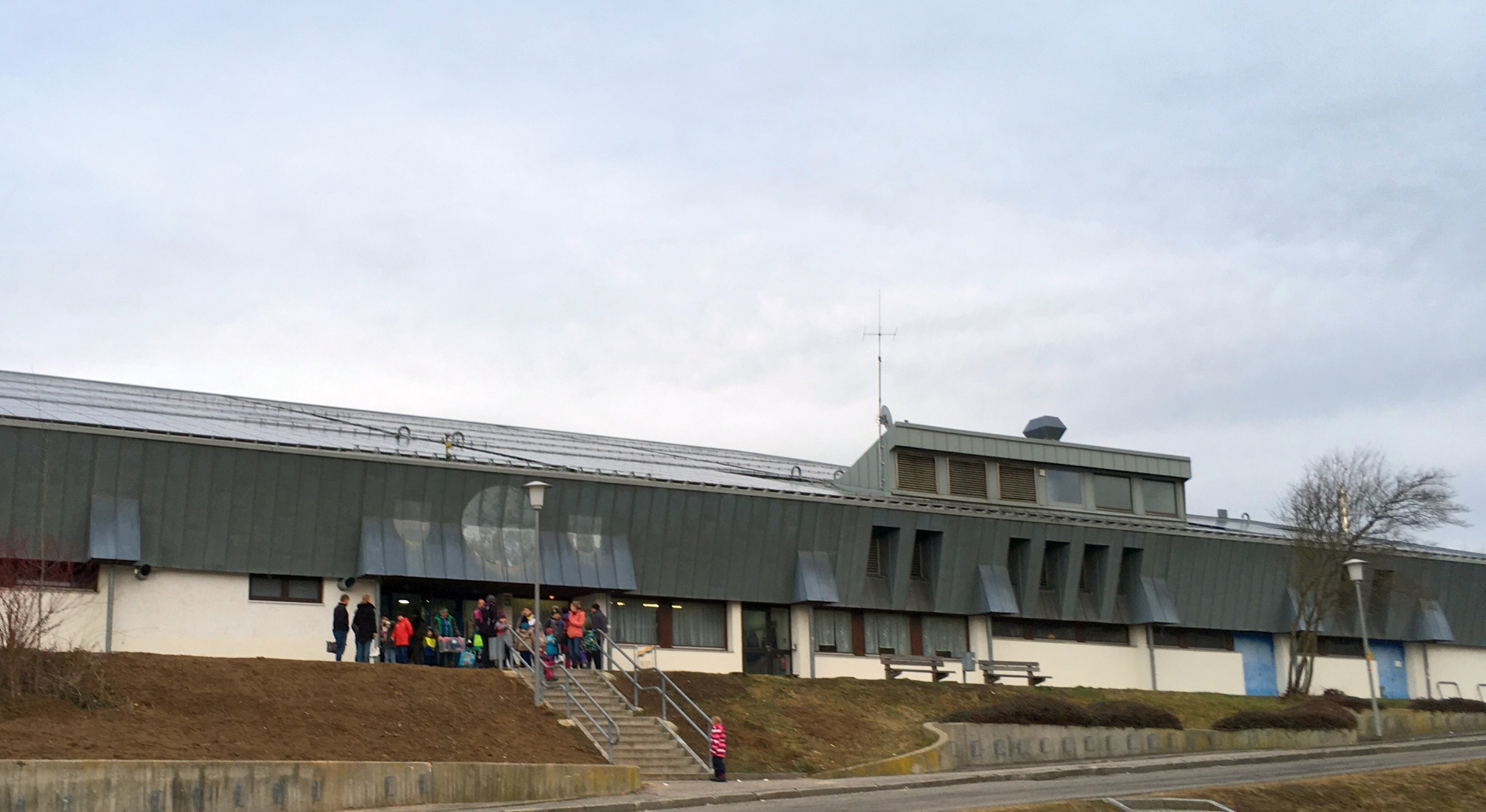 Eishalle Regen